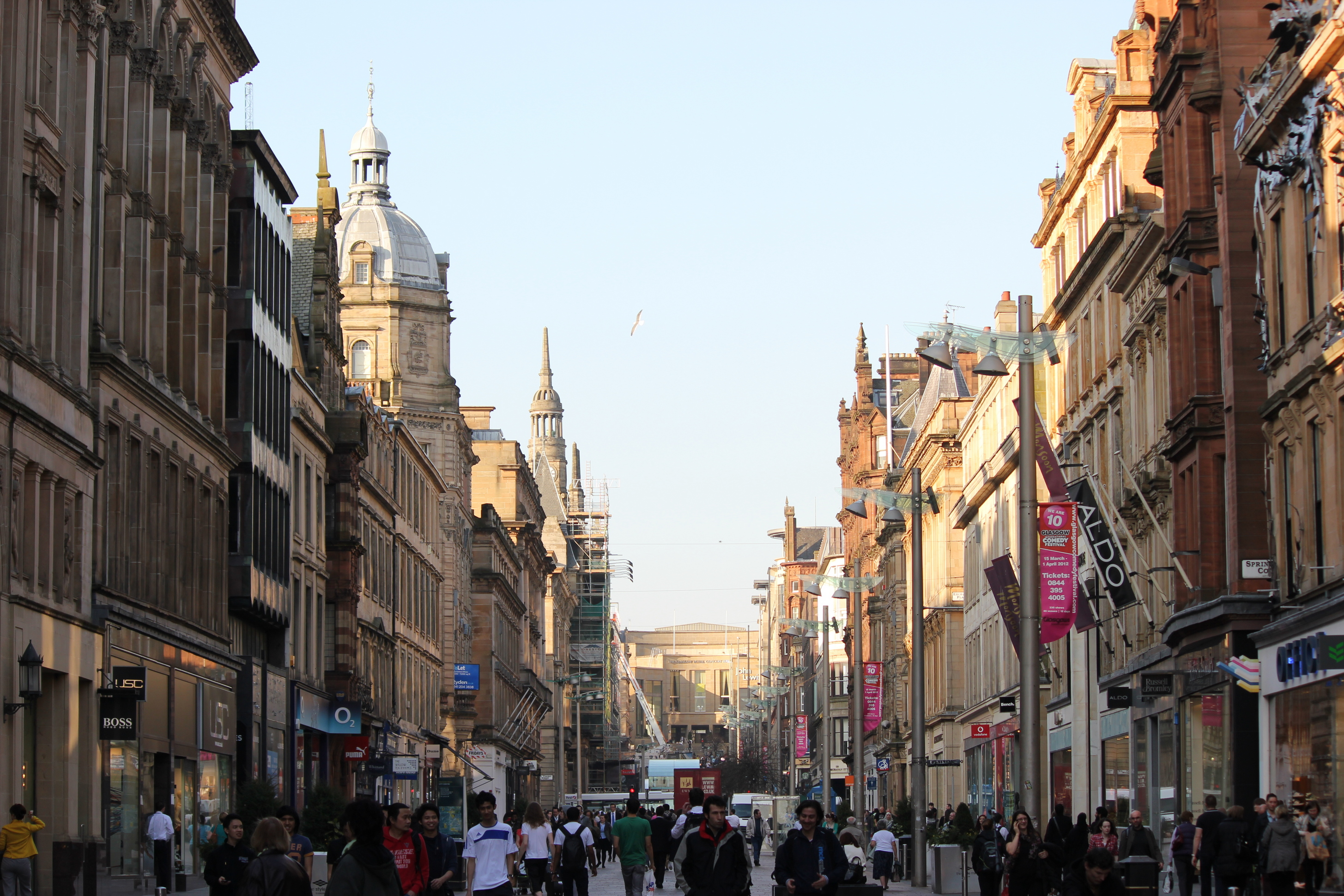 Die Fußgängerzone "Buchanan Street" im Stadtzentrum von Glasgow, Schottland.